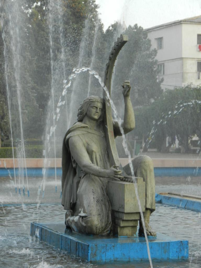 Sculptor Ion Jalea, 1933